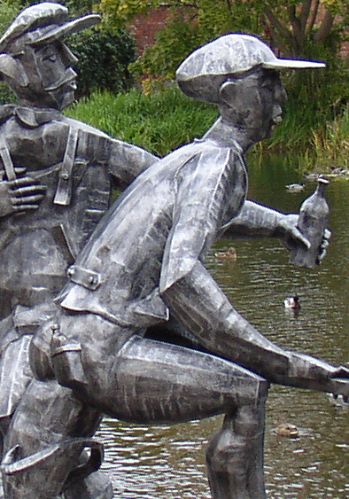 Die Figurengruppe Schleusenspucker wurde im Jahre 2006 vom Rathenower Bildhauer Volker-Michael Roth aus Anlass der Eröffnung der Landesgartenschau in Rathenow geschaffen.